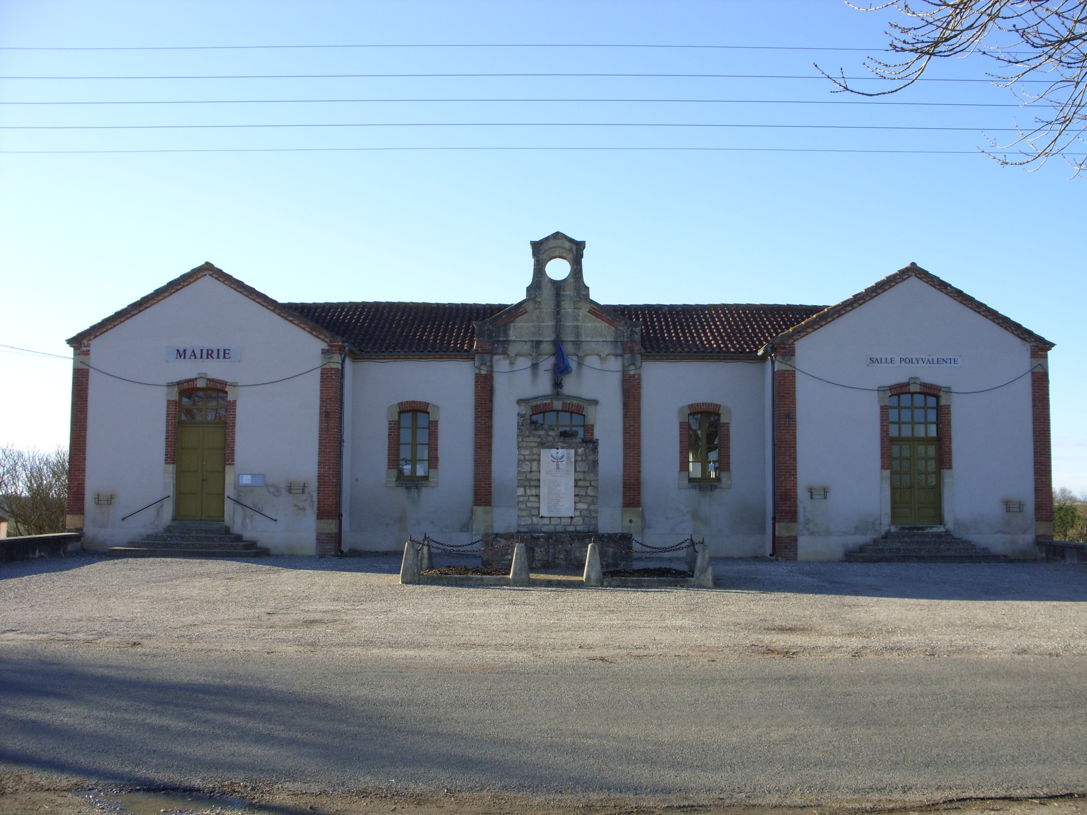 Mairie de Sérignac